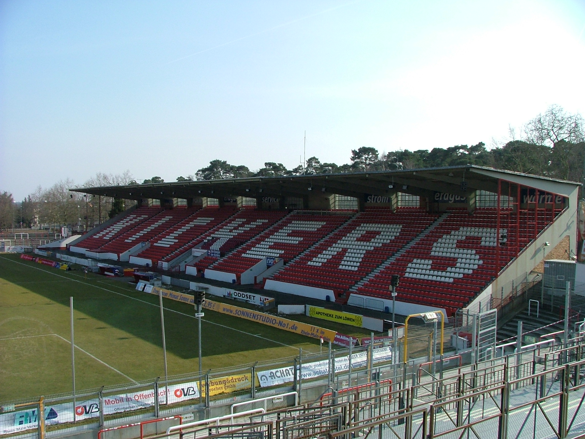 Stadion am Bieberer Berg, Offenbach am Main, Germany